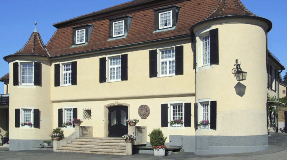 Schloss Affaltrach, Aufnahme Vorderseite